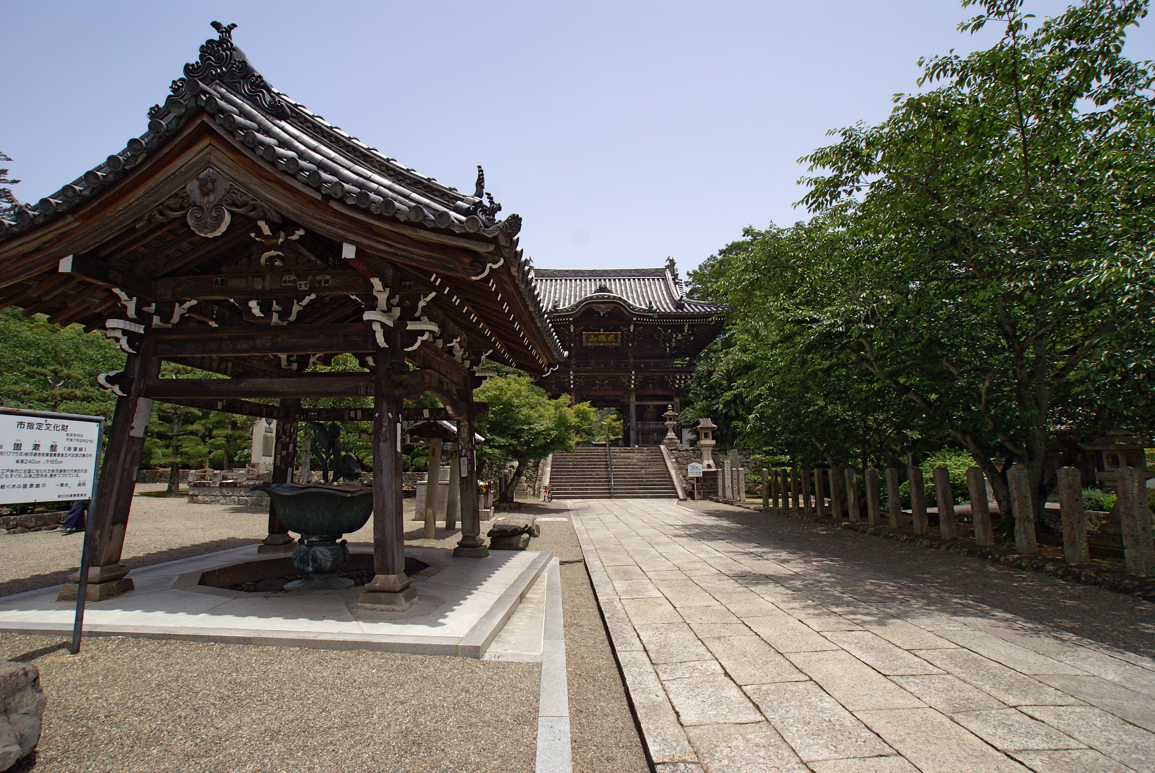 Kokawa-dera in Kinokawa, Wakayama prefecture, Japan